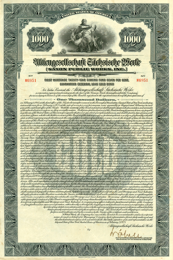 Wertpapier über eine Auslandsanleihe von 1000 Dollar der Aktiengesellschaft Sächsische Werke (ASW)